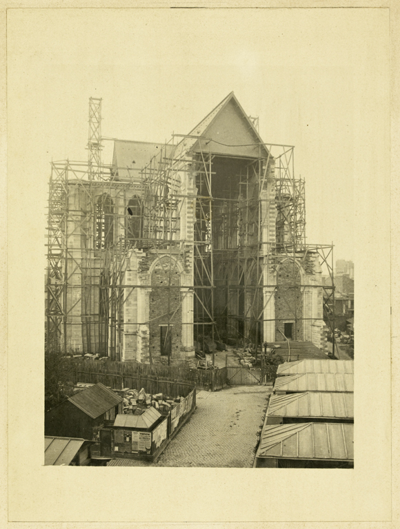 Vue sur la nouvelle église Saint-Aubin pendant les travaux de reconstruction.